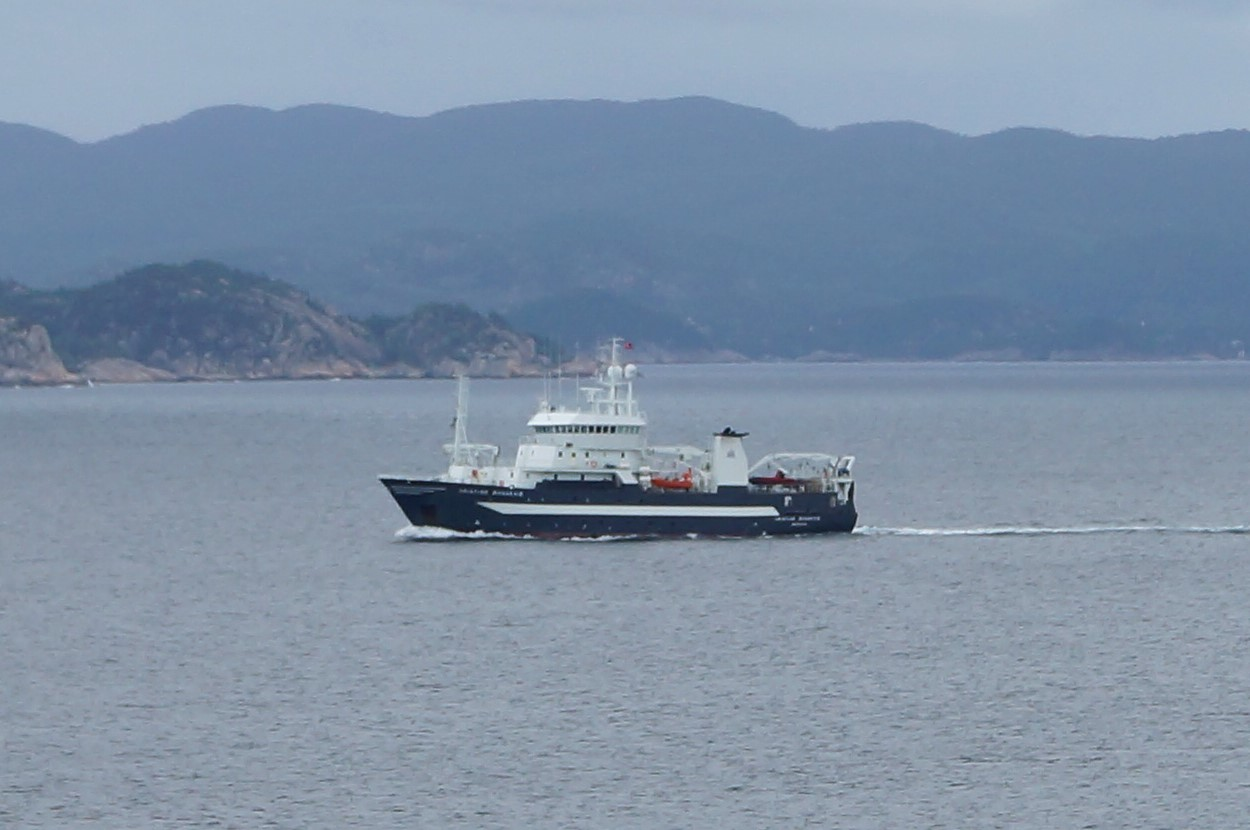 «Kristine Bonnevie» i Korsfjorden